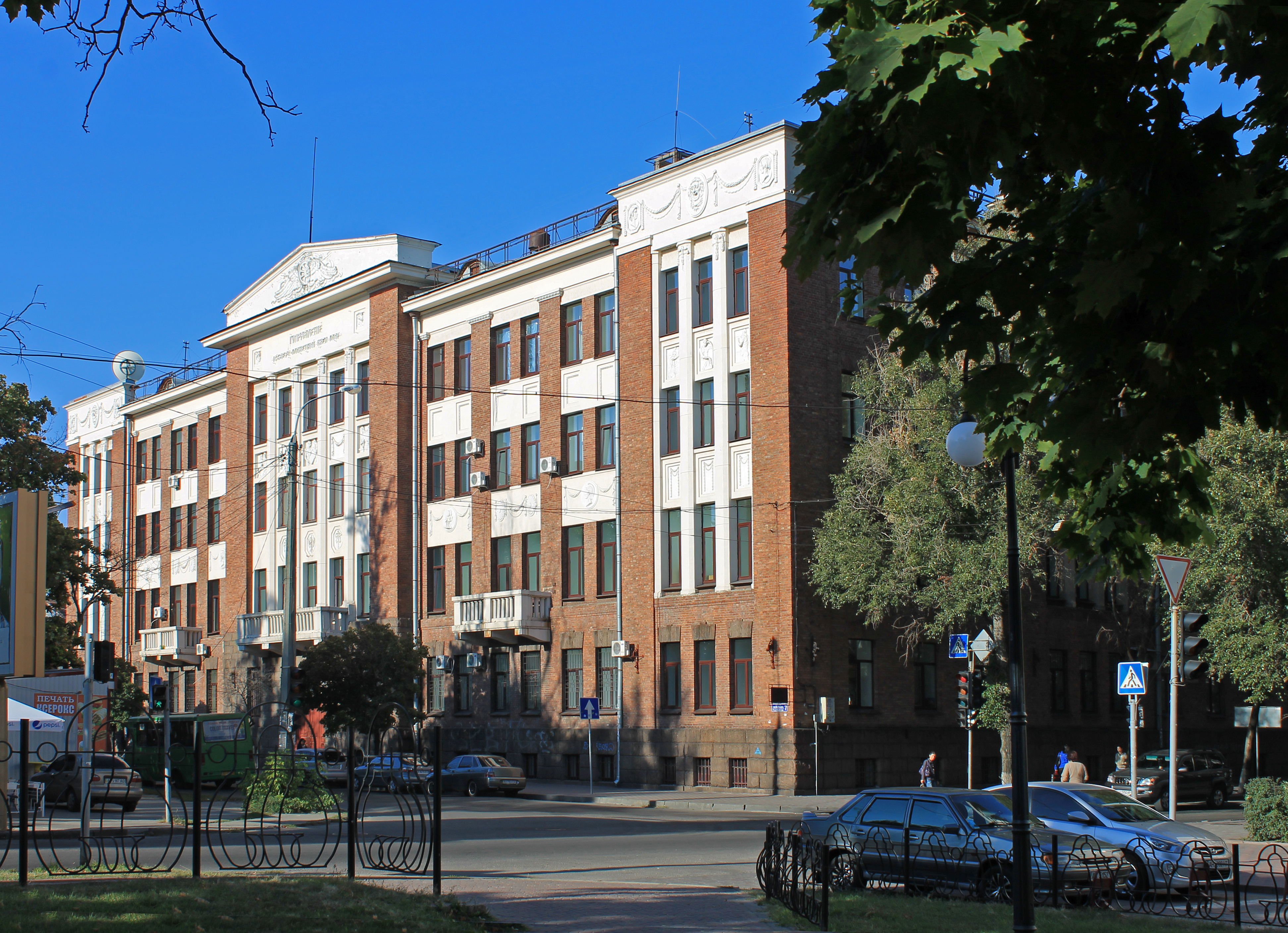 Колишня будівля Управління Північно-Донецької залізниці 1913 р., автор проекту- цивільний інженер С.П.Тимошенко у співавторстві з архітекторами П.І. Ширшовим та П.В.Соколовим при консультації академіка архітектури О.М.Бекетова. Адреса: площа Фейєрбаха,7, м.Харків.